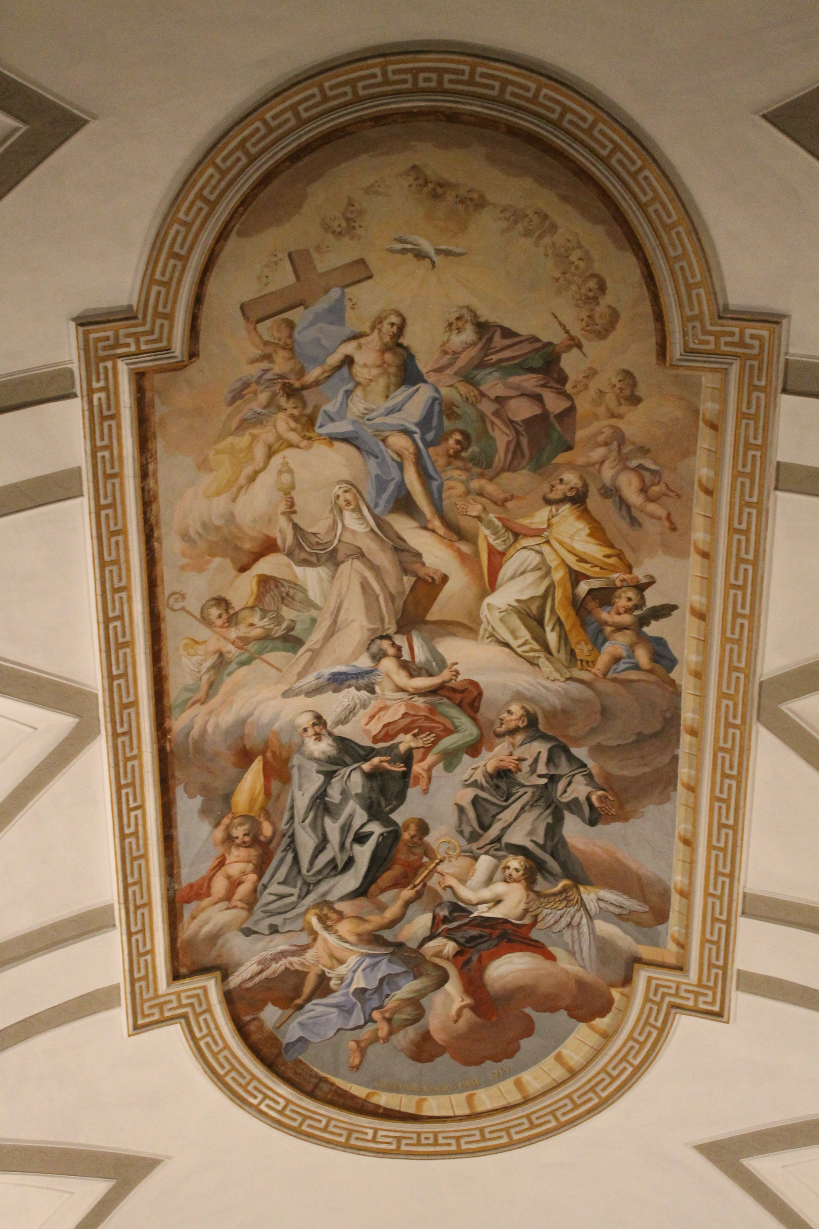 La chiesa dedicata alla S.S. Trinità e San Marziano sorge sulle rovine del cinquecentesco palazzo La Palumba. Costruita dopo il terremoto del 1693, la sua struttura si presenta a torretta, svettante verso l'alto: dalle sue terrazze e possibile ammirare paesaggi mozzafiato. Al suo interno custodisce opere di grande fattura, fra cui un bellissimo affresco di Sebastiano Lo Monaco nella volta della navata. Il pavimento è interamente ricoperta di ceramica di Caltagirone del XVIII secolo. Troviamo diverse tele, fra cui una crocifissione di Giuseppe Velasco e una pala raffigurante Sant'Antonio, del XIV sec, circa. La chiesa fa parte del gruppo dei monumenti nazionali.